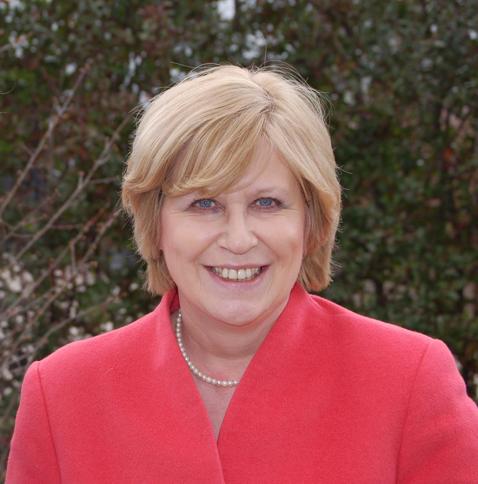 Ulrike Merten März 2009